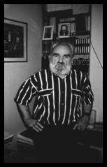 Српски (ћирилица): Фотографија Војислава Бубање